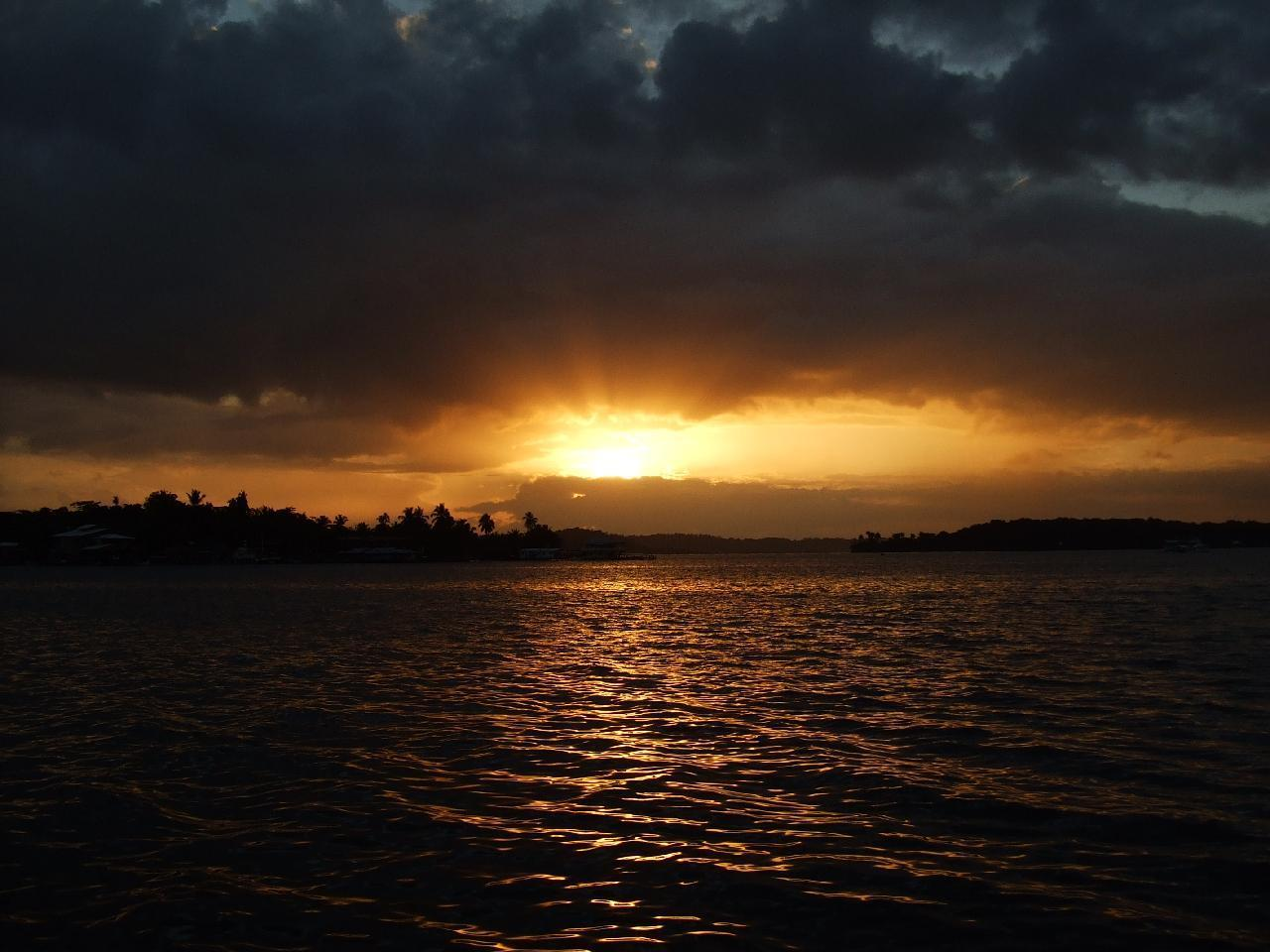 Sonnenaufgang auf Isla Colón, Bocas del Toro, Panama